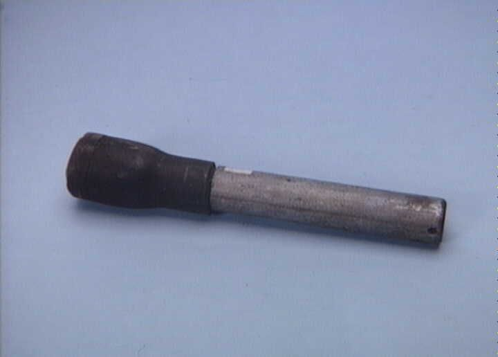 Hjemmelavet totenschlæger fremstillet af en maskinlærling, der var aktiv i det illegale arbejde i Rungsted